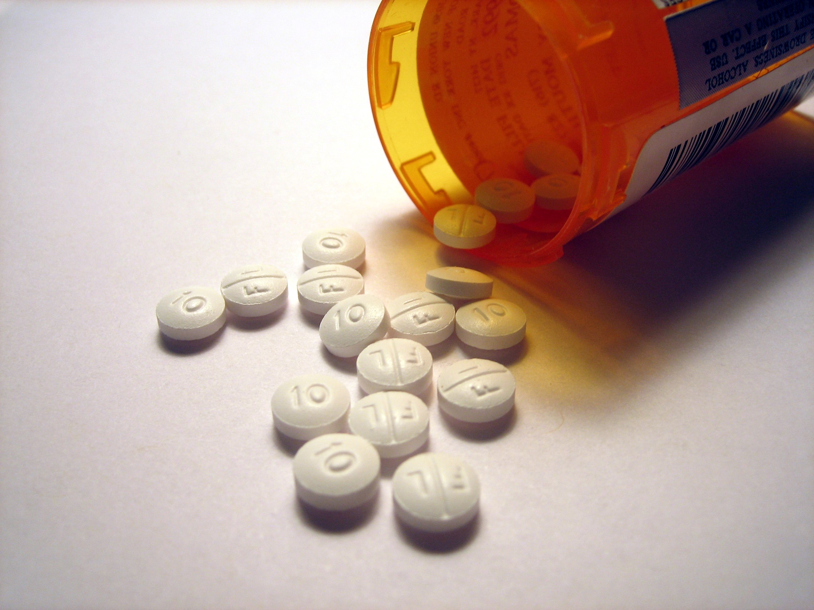 Escitalopram 10mg Tablets (Lexapro brand)